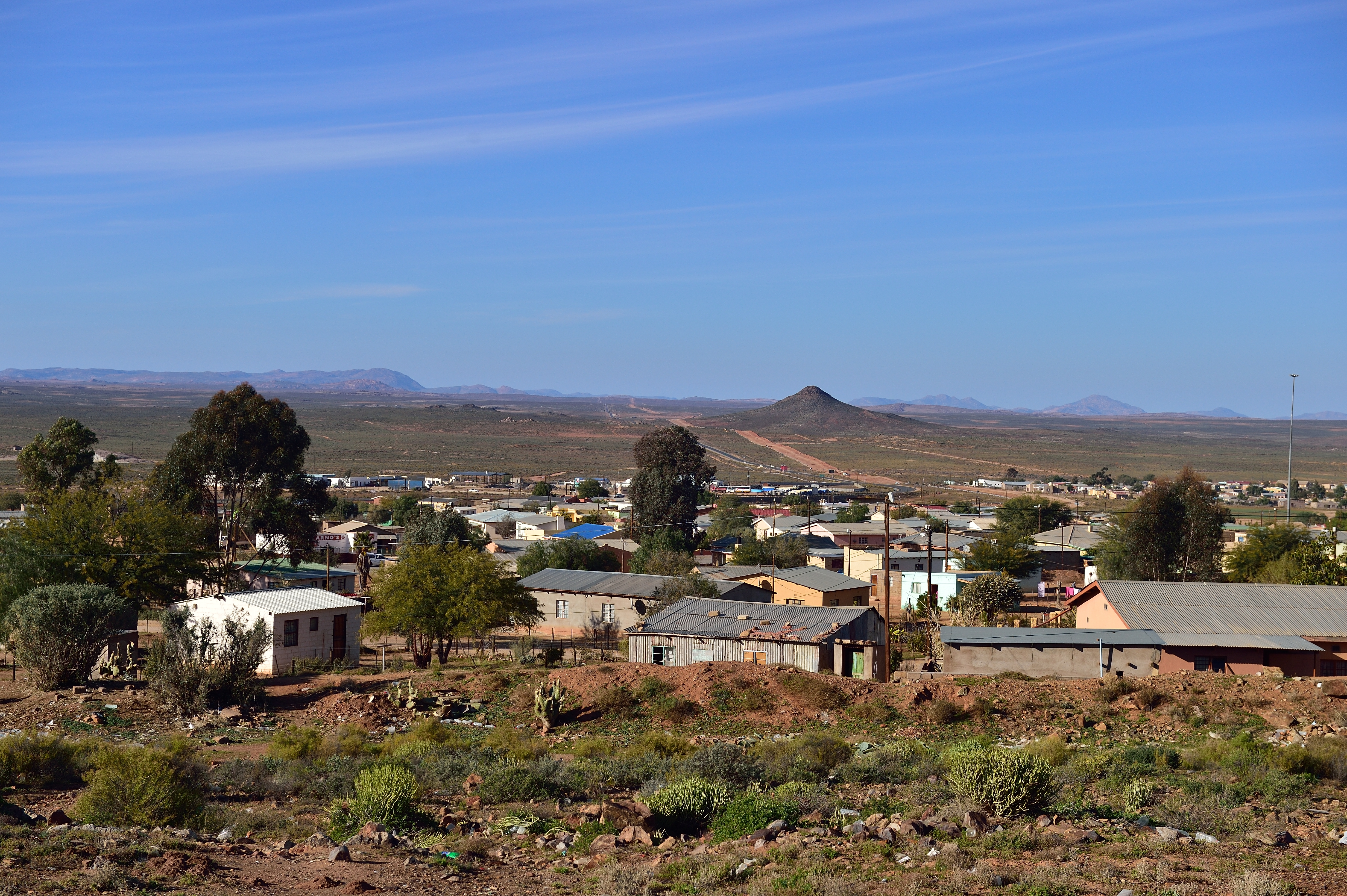 Vue de Northern Cape en Afrique du Sud.